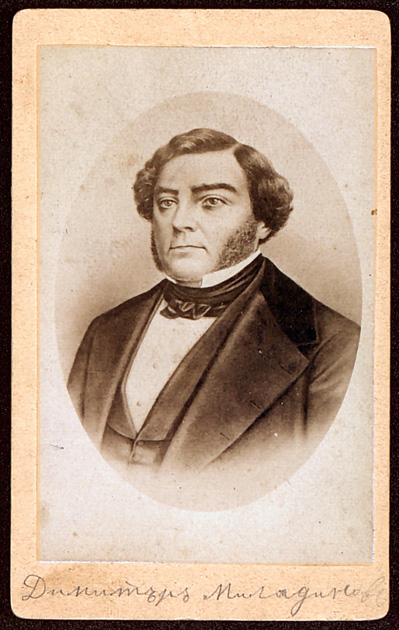 Димитар Миладинов